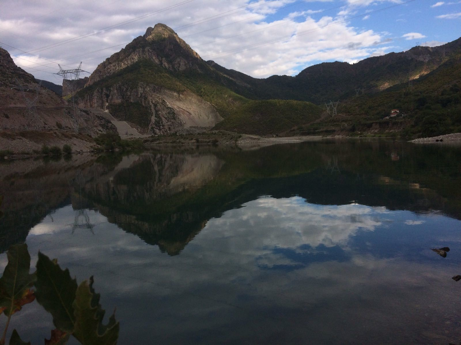 Koman, Albania